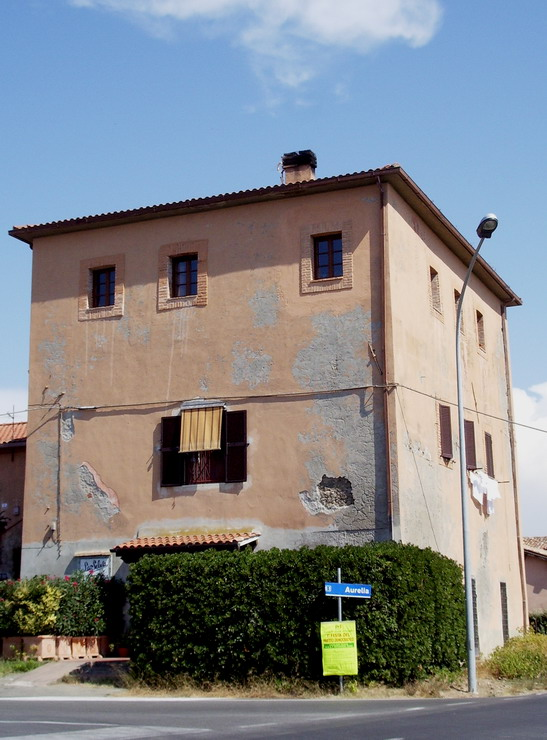 Torre di Selva Nera Capalbio